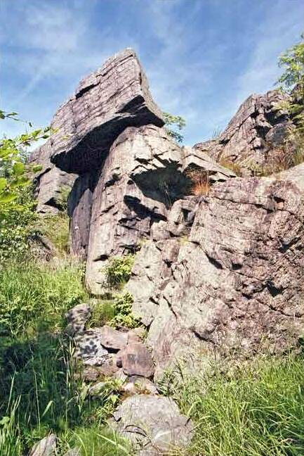 Skály na úbočí kopce Wolek autor:Zp